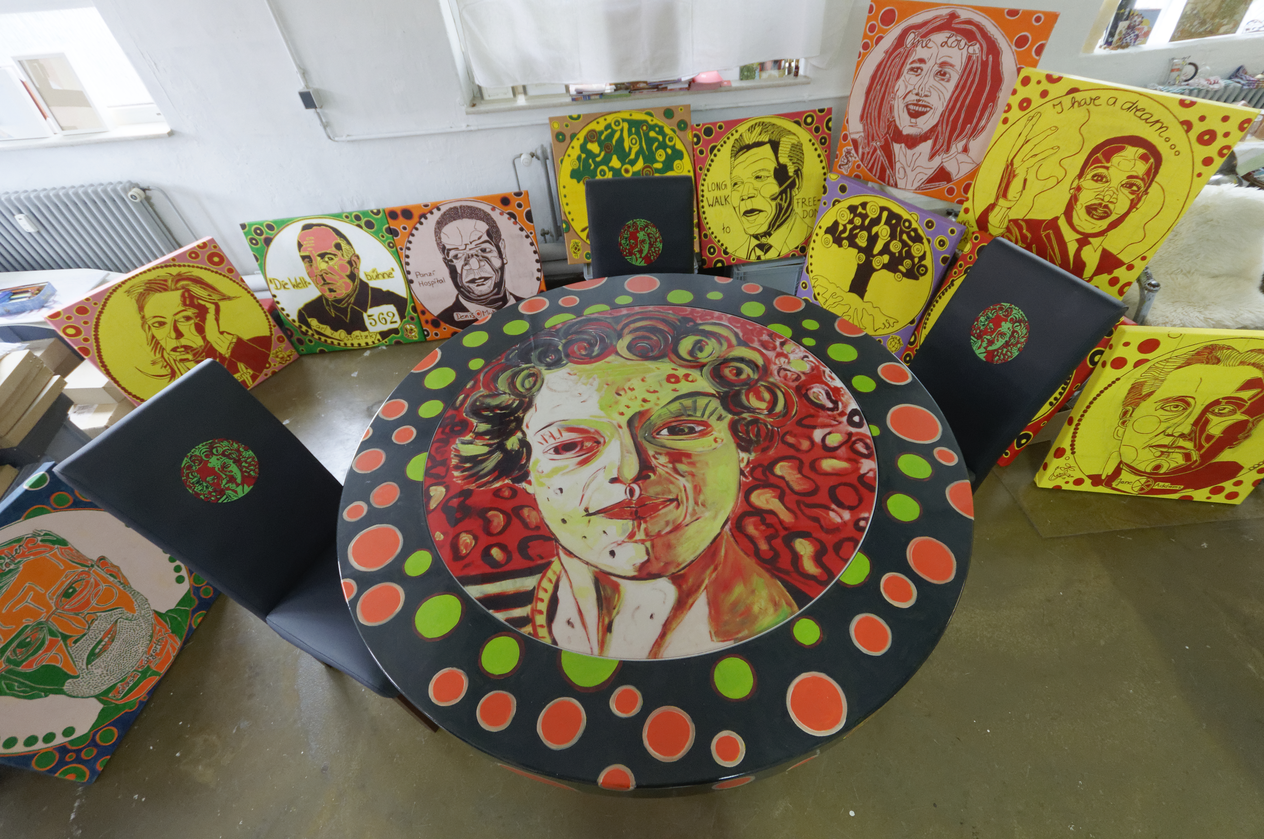 Bilder aus der Galerie von Eva Bur am Orde 2020 mit dem Schwerpunkt ornamentaler und figurativer Darstellungen.